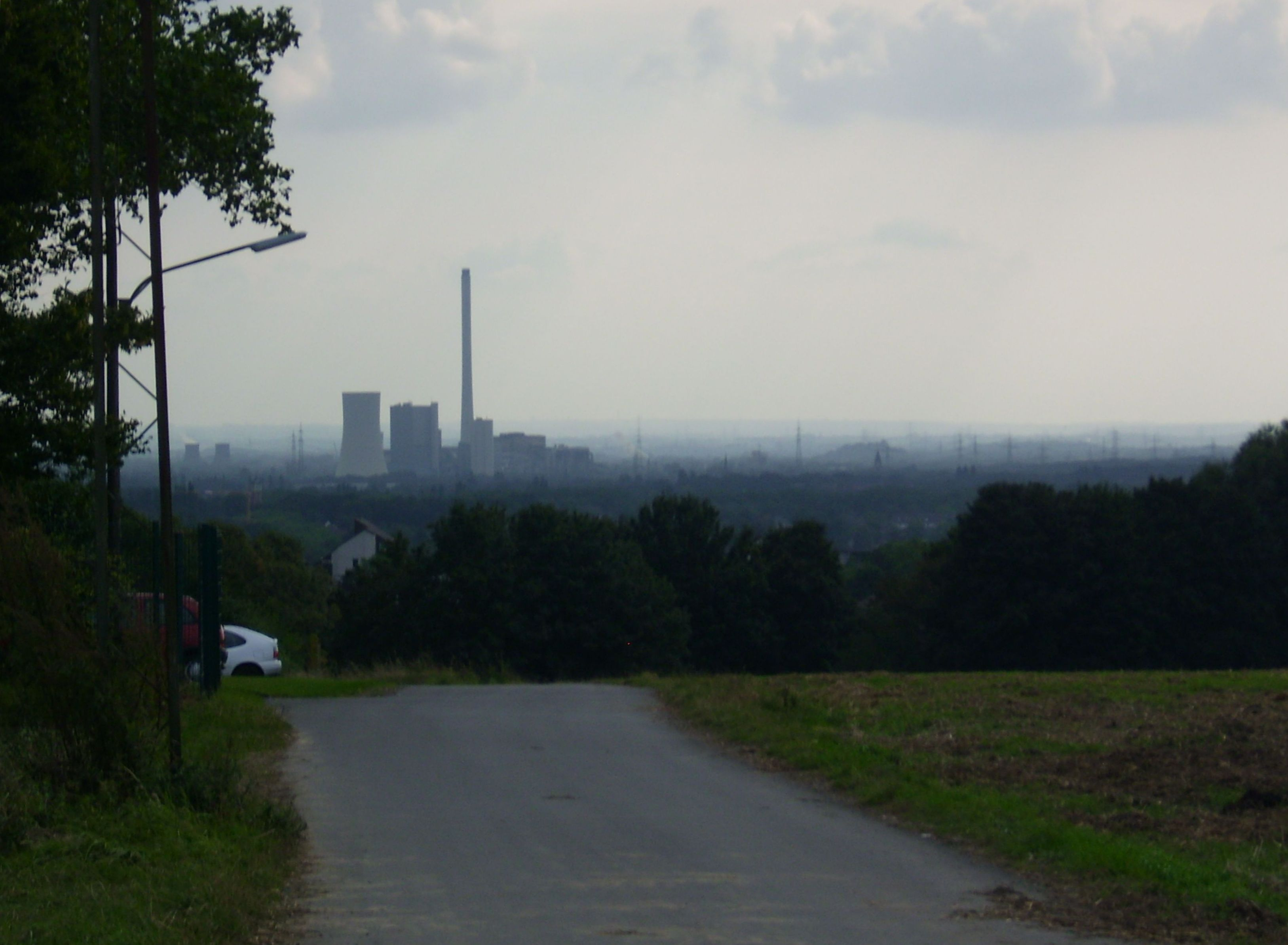 Blick vom Vestischen Höhenrücken am Fritzberg auf das Kraftwerk Herne